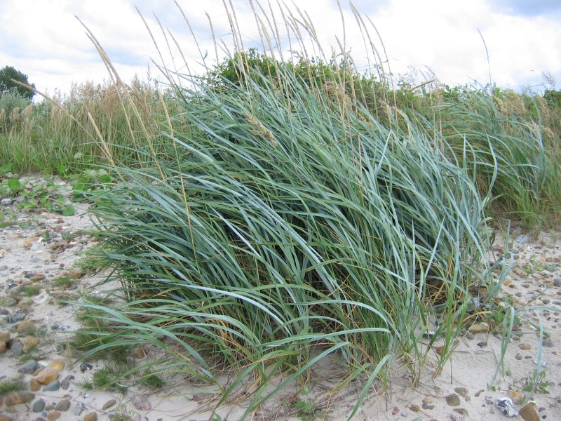 Strandroggen Leymus arenarius, Habitus